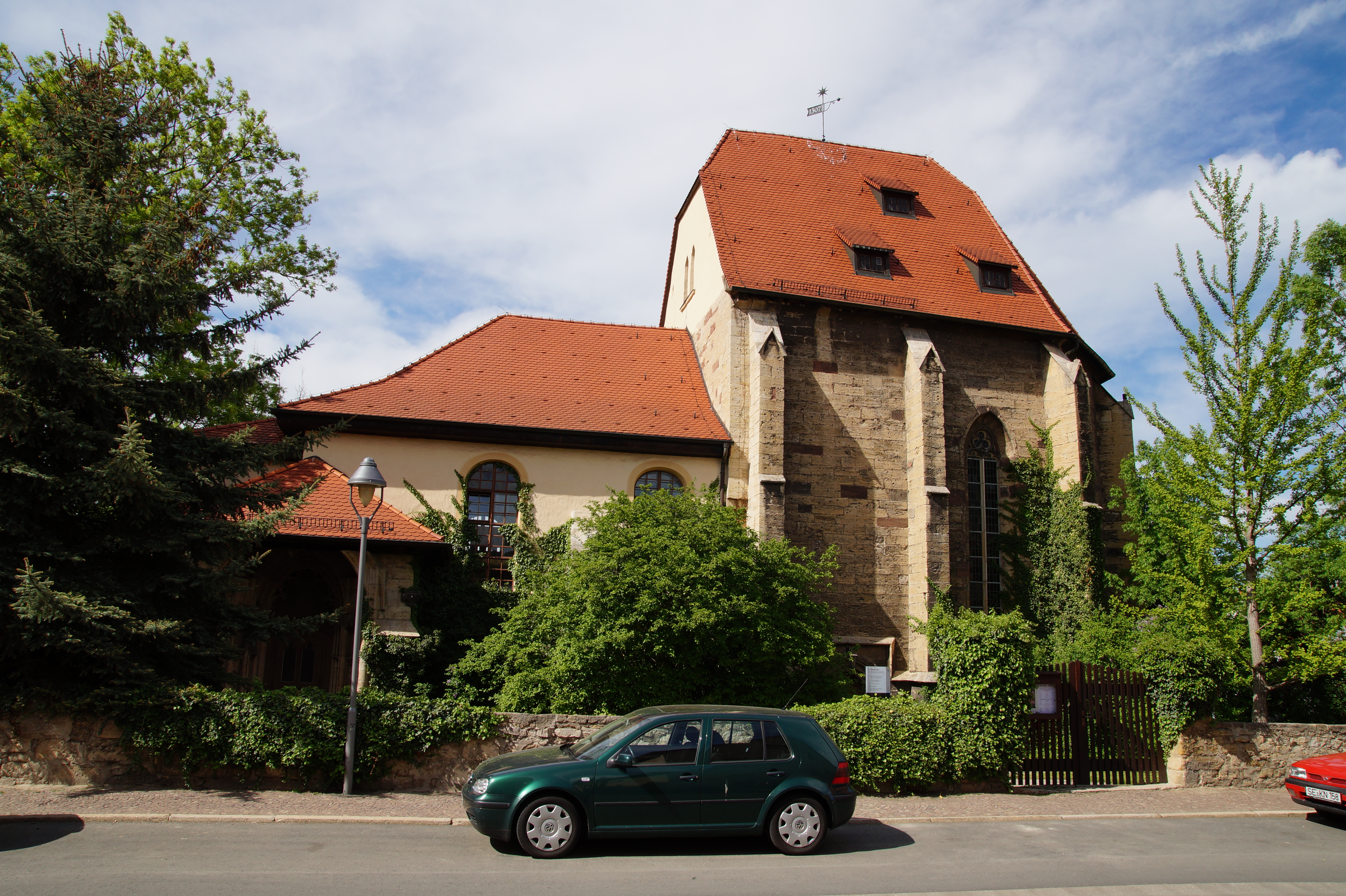 Die Schillerkirche im Jenaer Ortsteil Wenigenjena